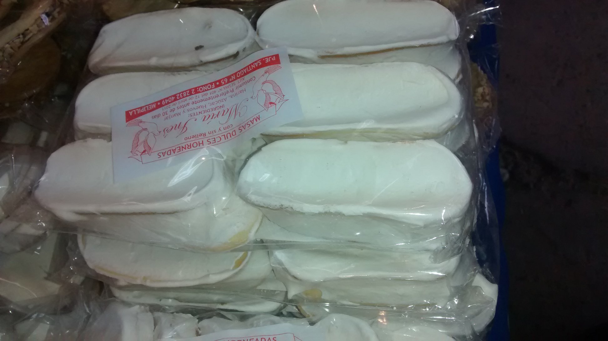 Dulces horneados base de harina y relleno de dulce de leche o manjar